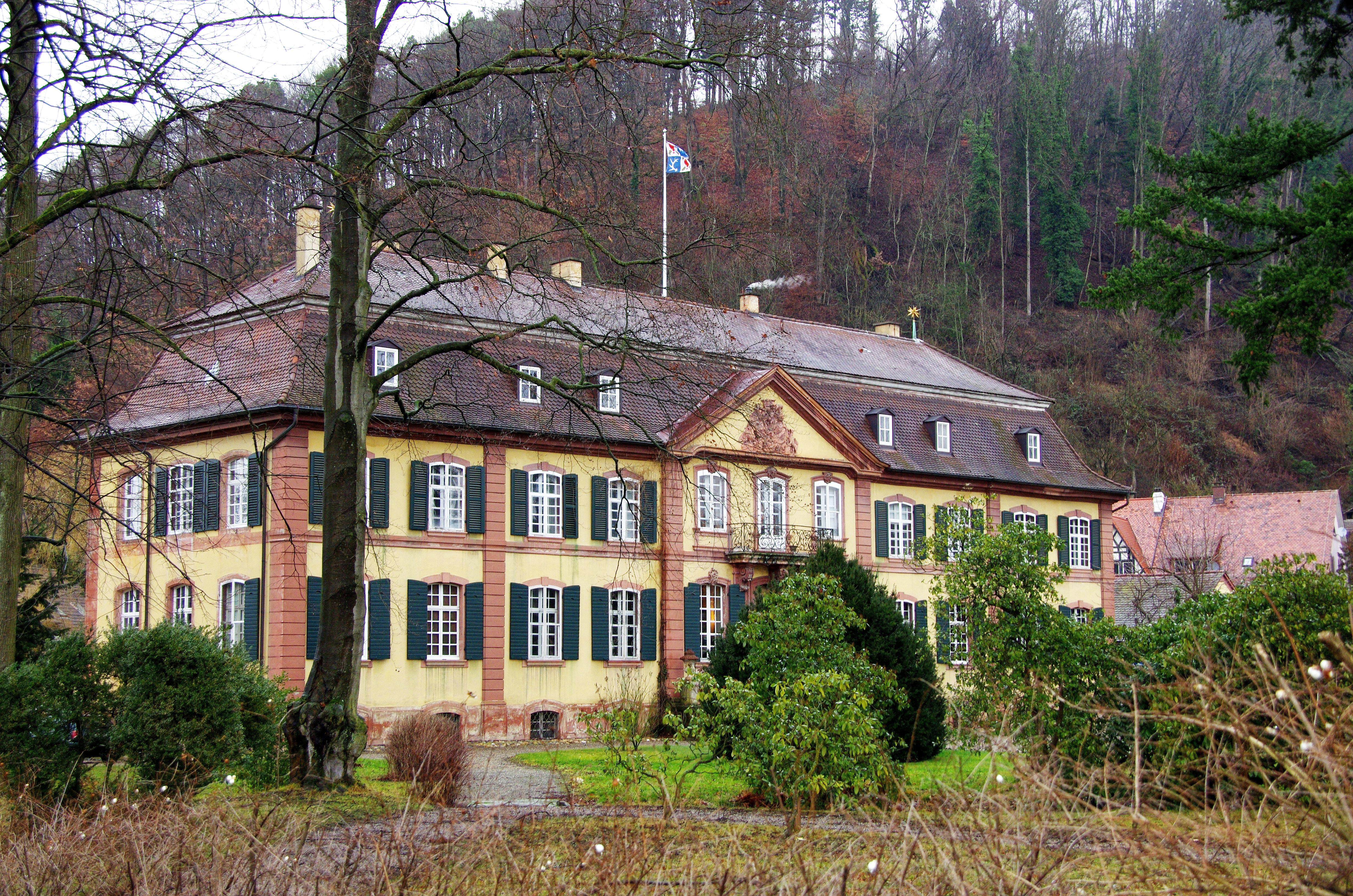 Bilder aus Freiburg